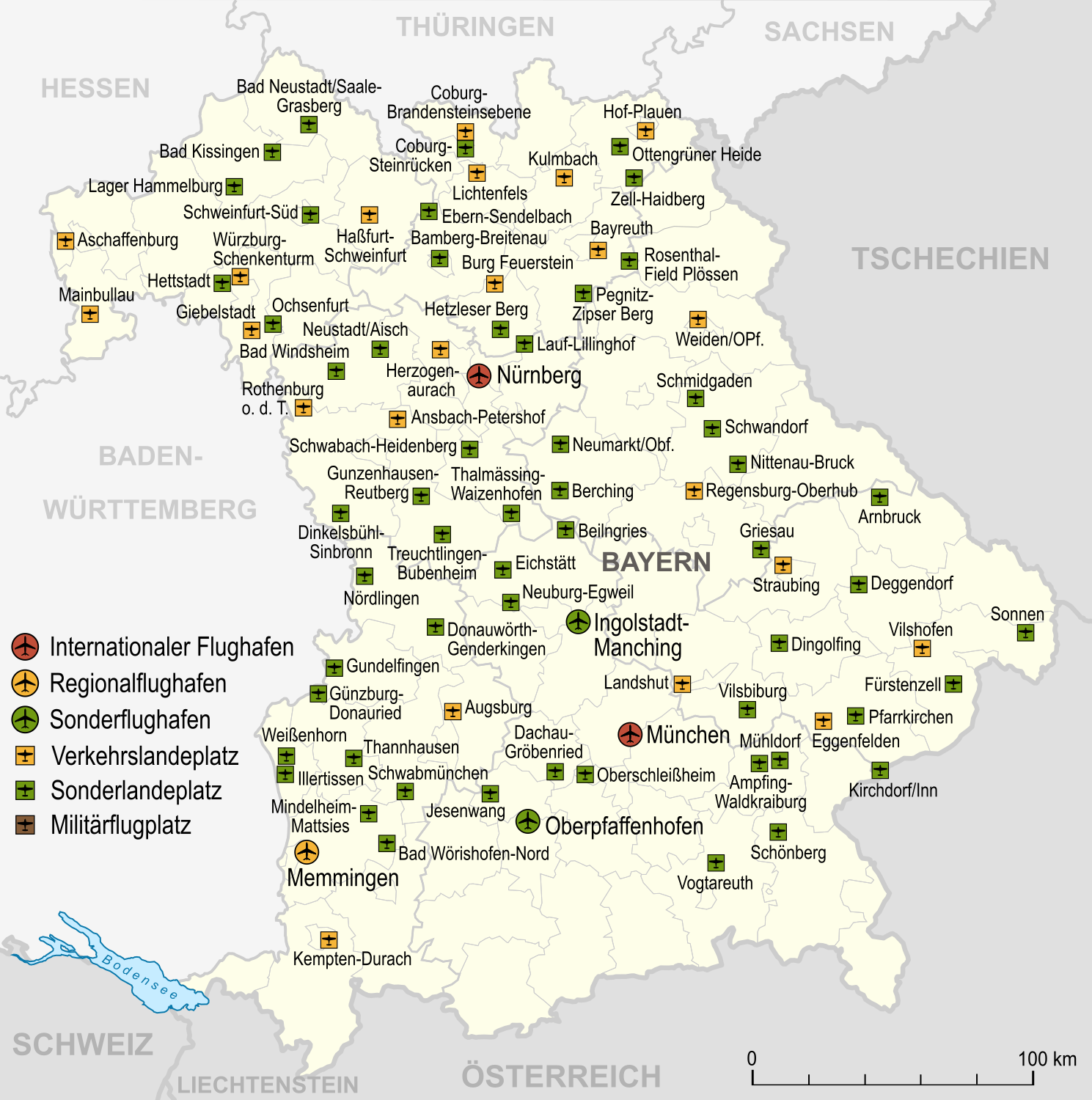 Flughäfen, Verkehrslandeplätze und Sonderlandeplätze in Bayern, Stand 2007